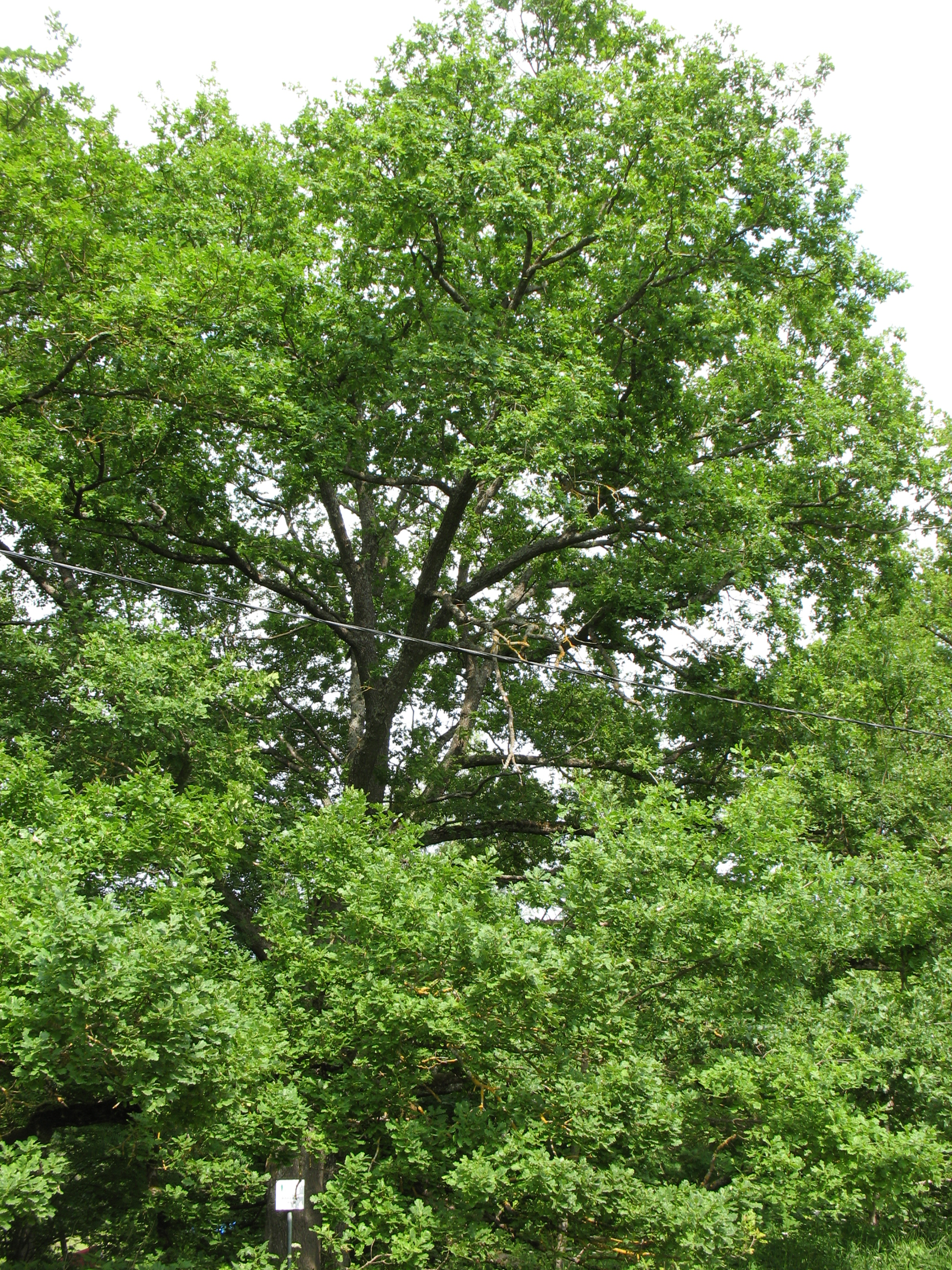 Kaitstav looduse üksikobjekt, Harjumaa, Harku vald, Tiskre küla